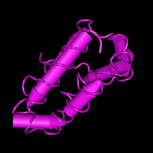 NMR solution structure of the carnobacteriocin B2 protein